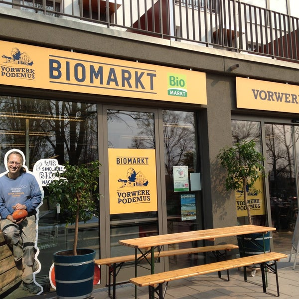 Vorwerk Podemus Laden